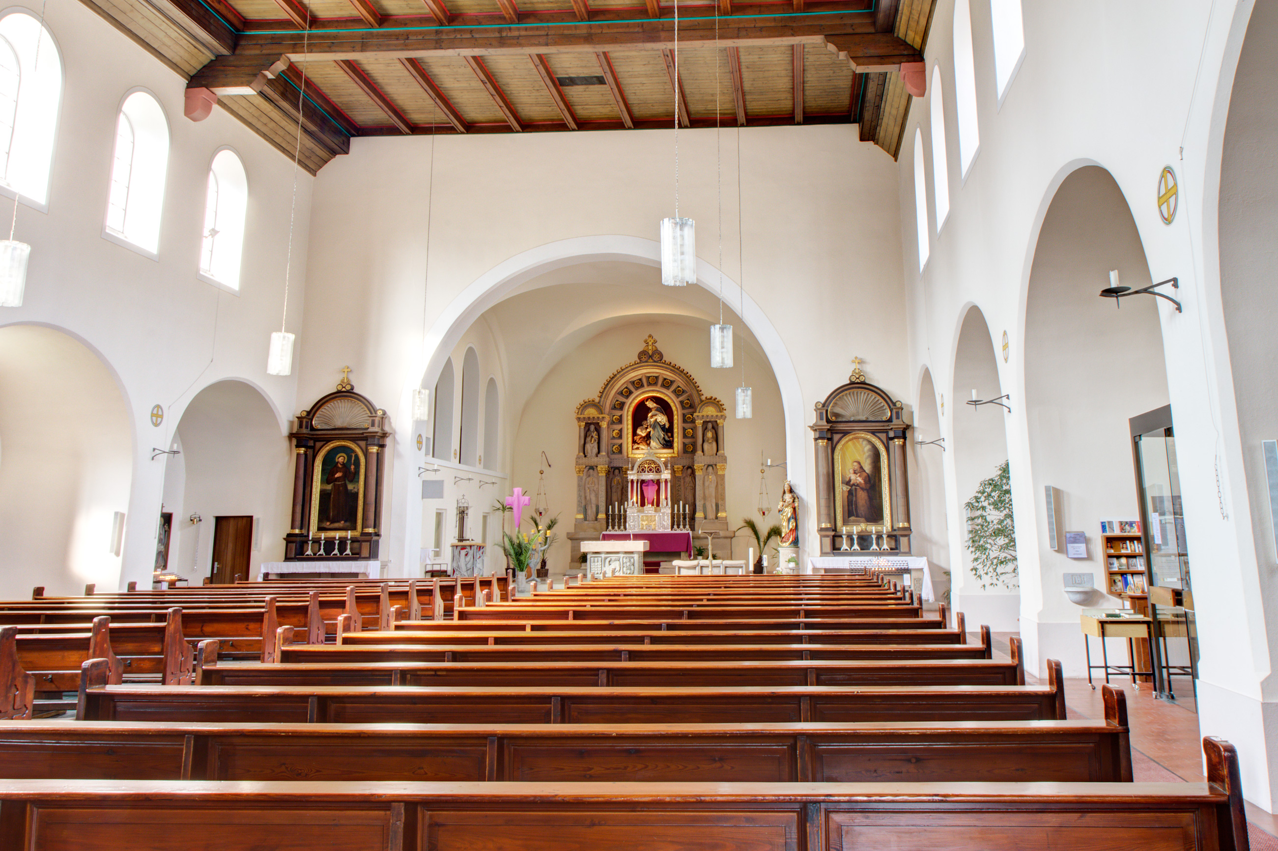 Kirche im Kapuzinerkloster (Kapuzinerkirche St. Elisabeth) in Aschaffenburg (Bayern - Deutschland). Erbaut 1626, Erweiterung 1908 - 1909, Umgestaltung seit 1945.